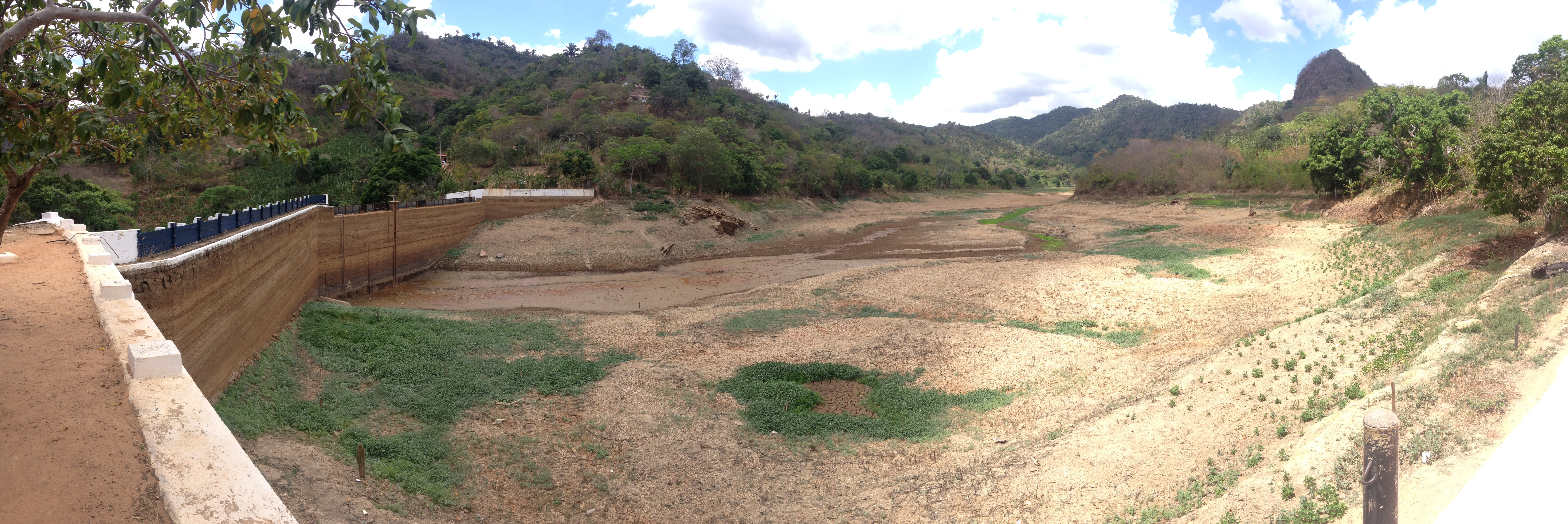 Panorama da barragem Tijuquinha em Baturité, Estado do Ceará, em dezembro de 2013, com seu leito seco.